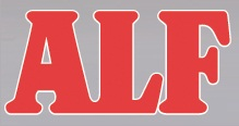 Serie ALFREDO